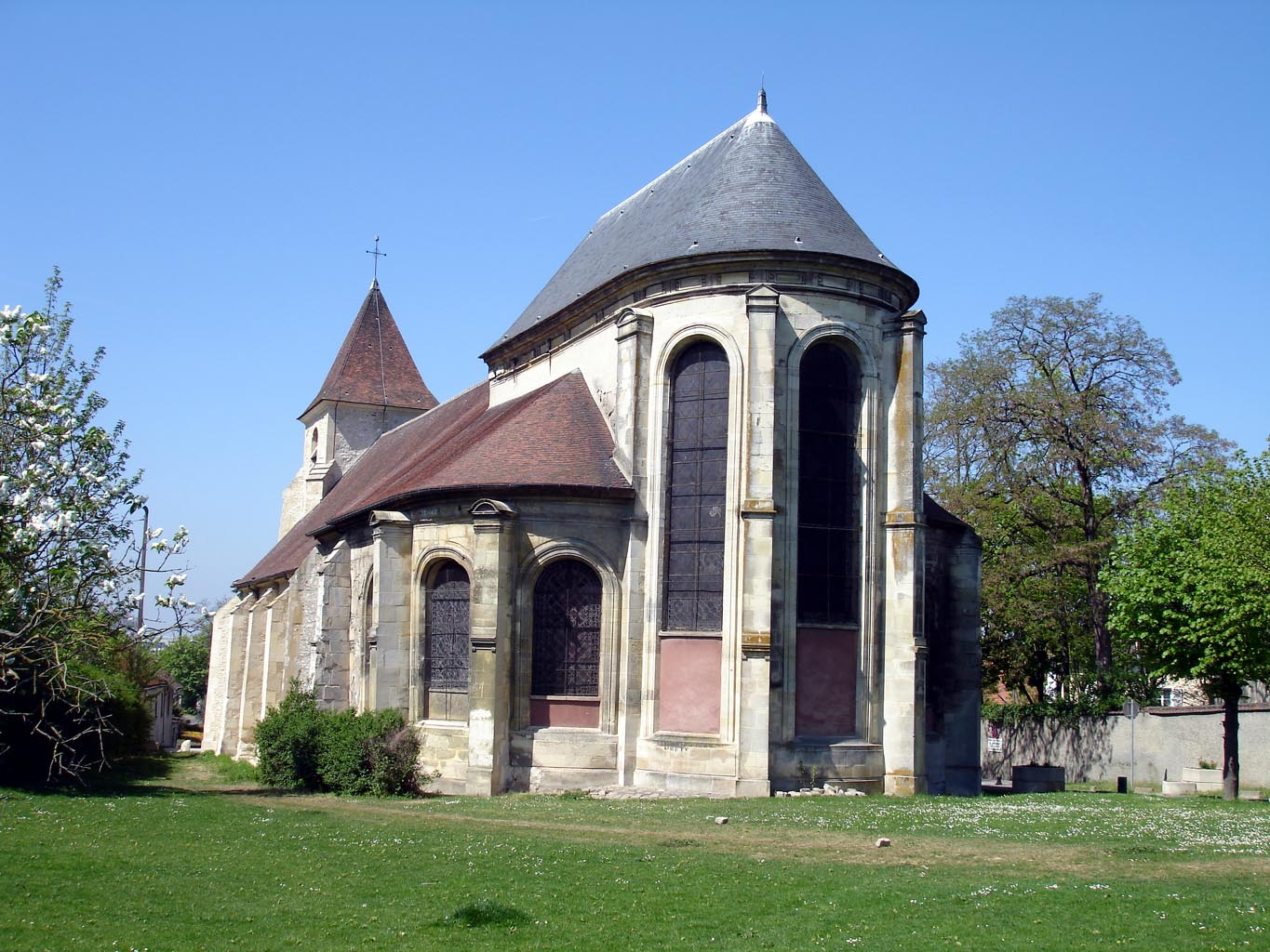 Chevet de l'église Saint-Eloi à Roissy-en-France (Val-d'Oise), France